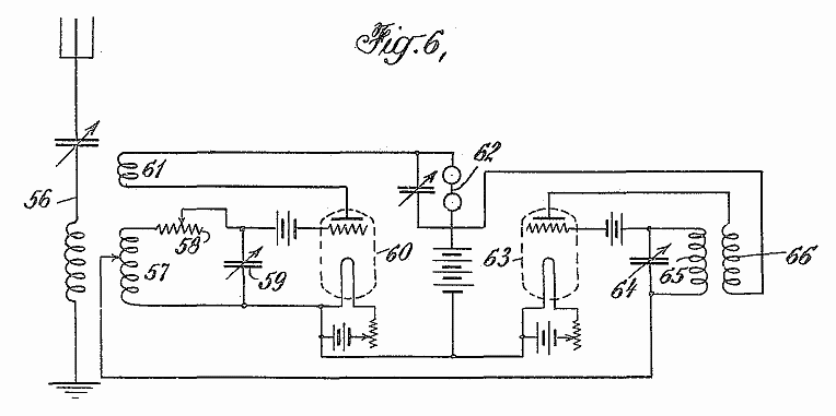 Super-Regenerative Empfänger (Pendelempfänger)